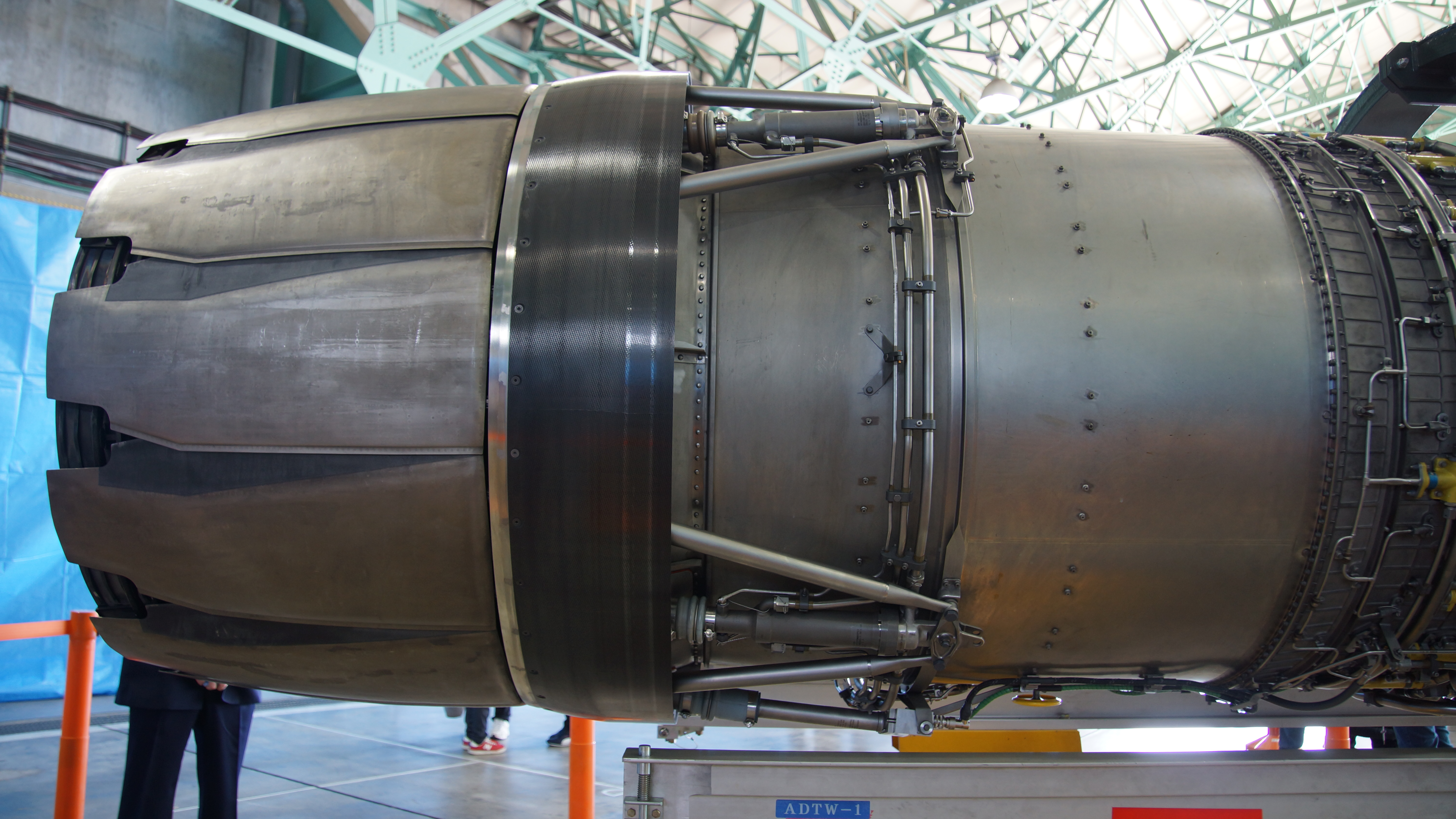 石川島播磨重工業（現：IHI） F110-IHI-129ターボファン・エンジン アフターバーナー及び排気ノズル 右側面。2017年11月19日 航空自衛隊岐阜基地にて。